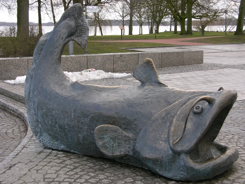 Description: Skulptur eines Welses auf dem Marktplatz in Bad Zwischenahn Source: selbst gemacht / 2005-03-13 Photographer: NewPapillon